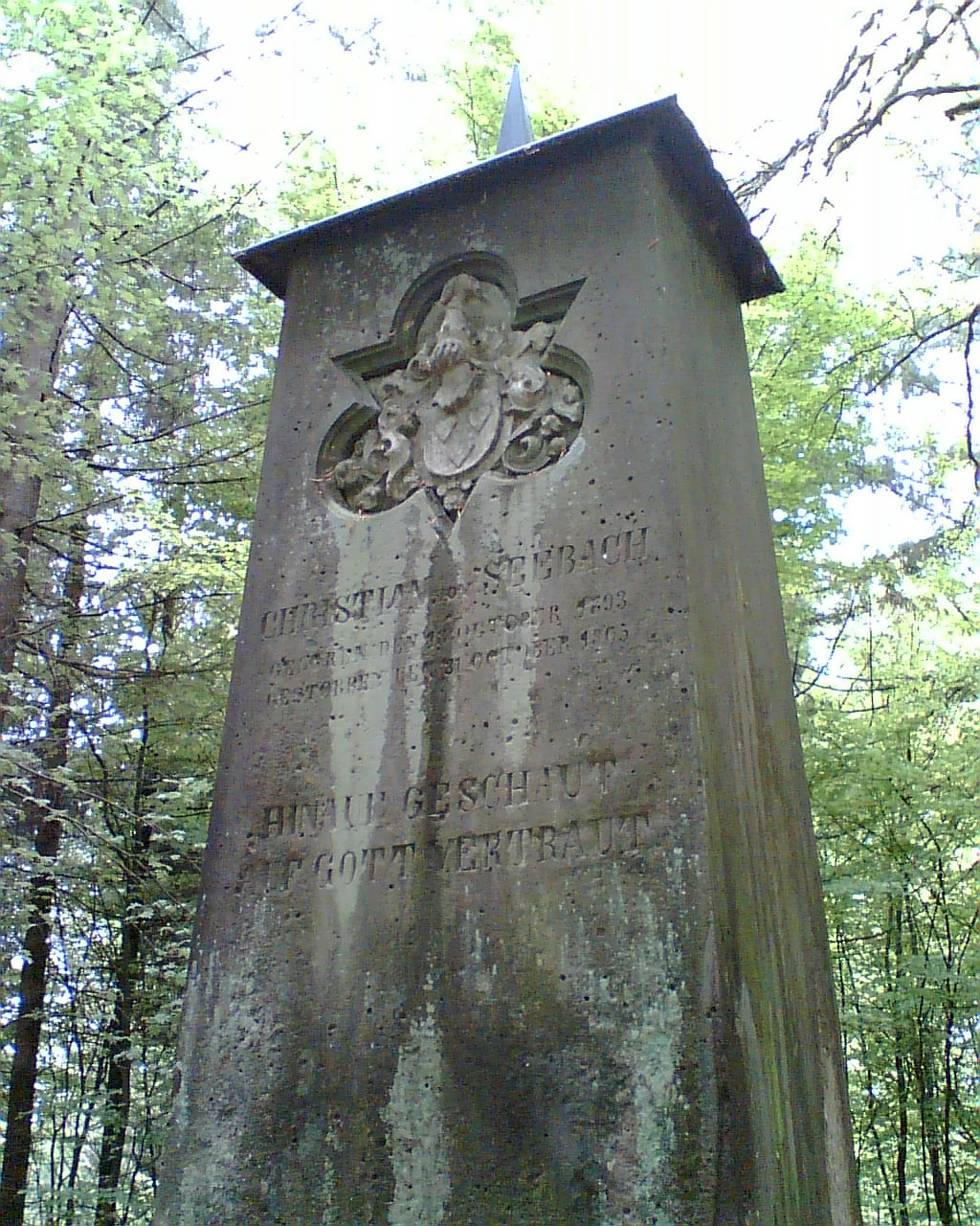 Grabmal für Christian von Seebach auf dem Italsberg im Solling. Monolith mit Abdeckung, Wappen, Name, Daten, Sprüchen